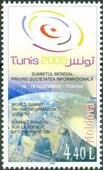 2005. Всемирный Саммит по Информационному Обществу в Тунисе